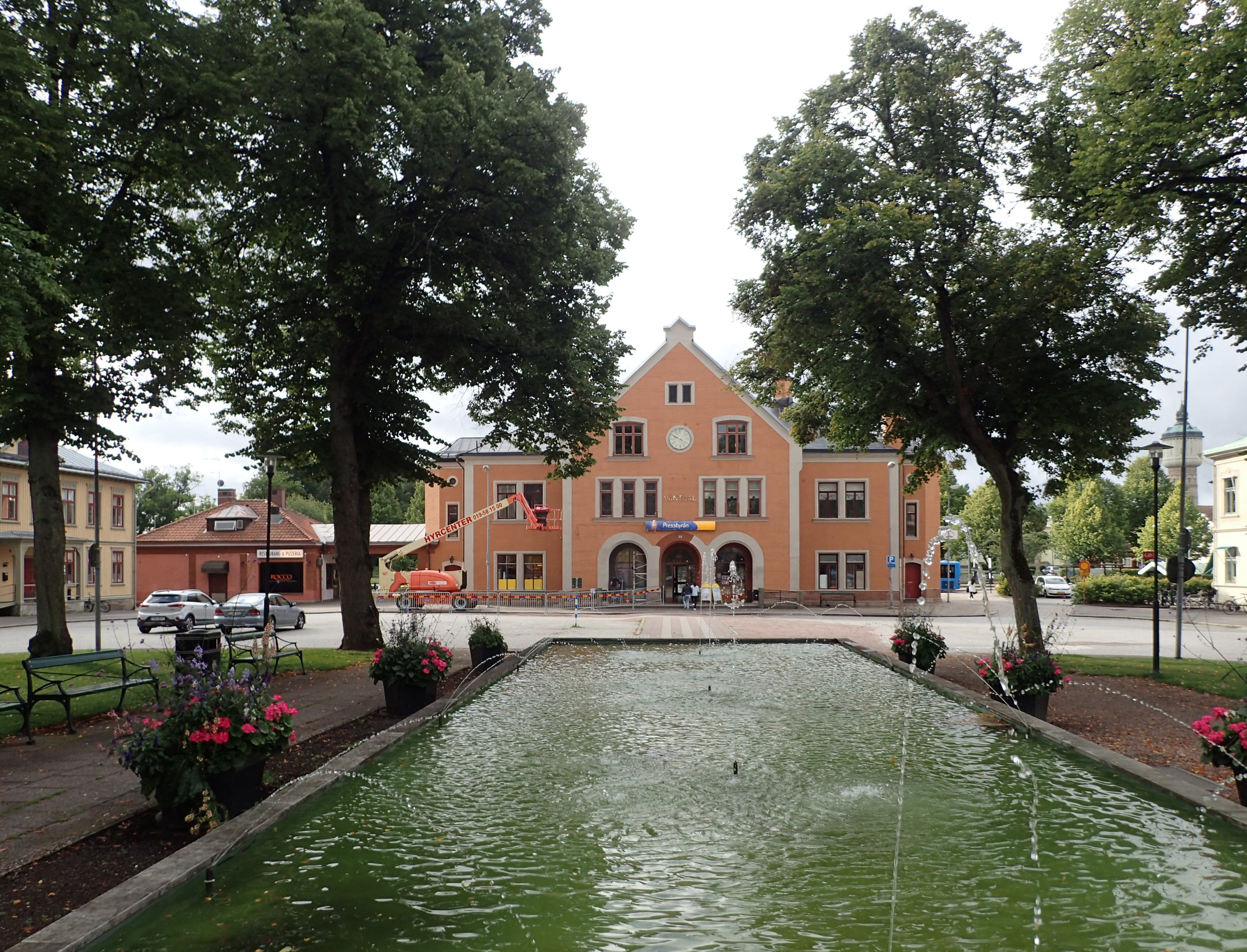 Järnvägsstationen, Skara. Byggnadsår 1899